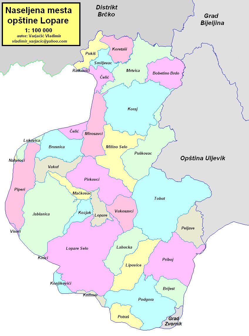 Opština Lopare